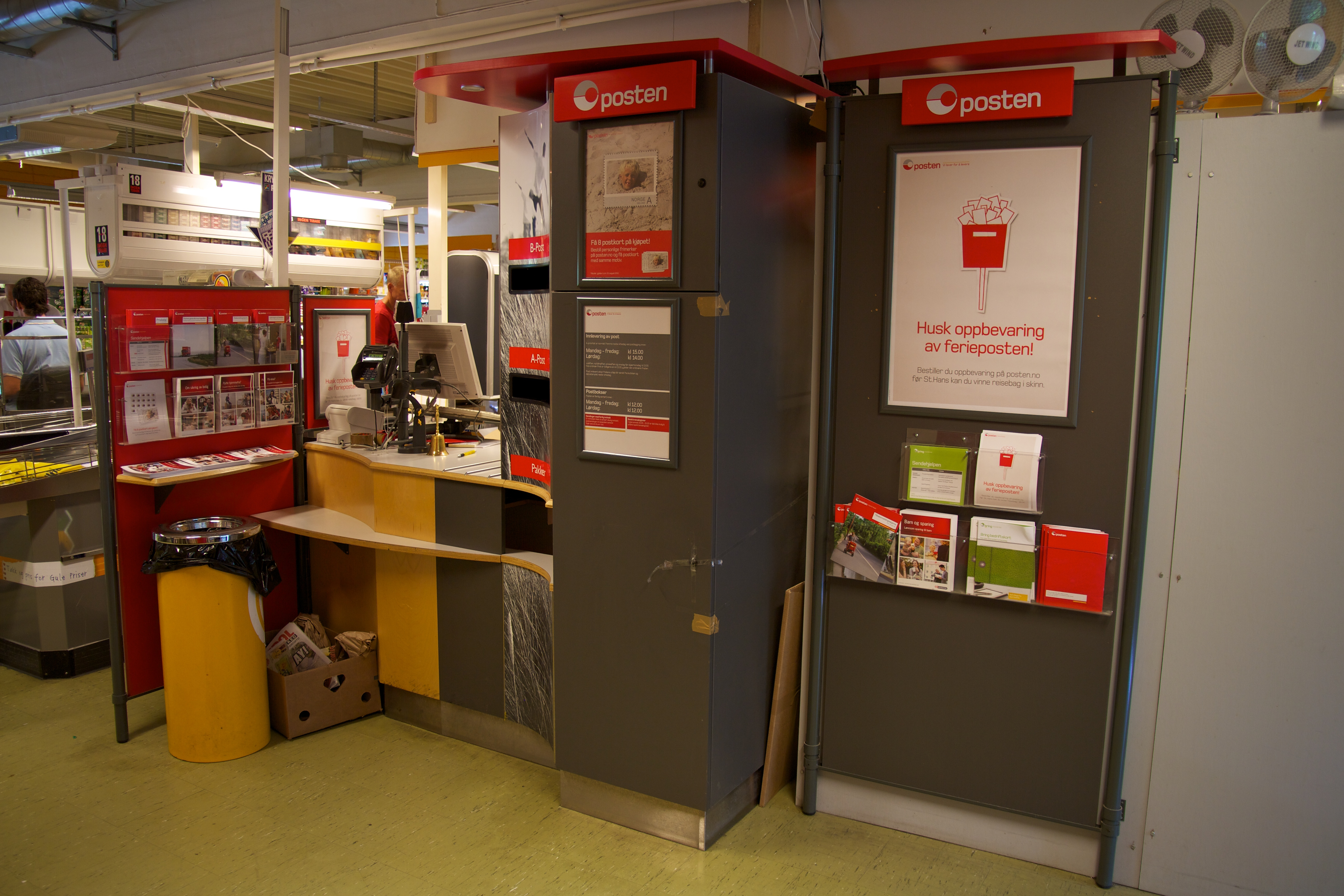 Post i butikk-skranken i Coop-butikken på Løkken Verk.